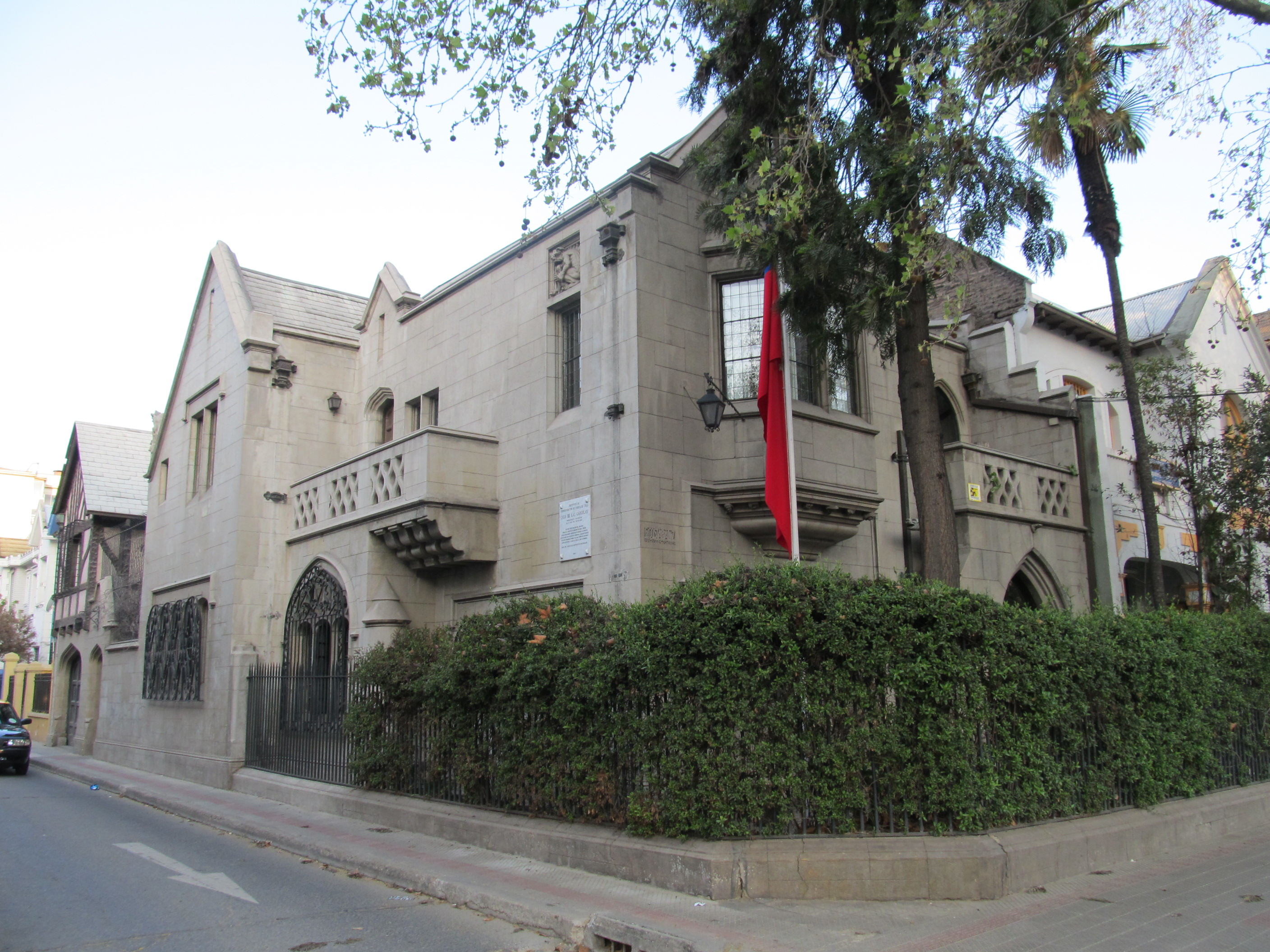 Casa de Las Gárgolas This is a photo of a national monument in Chile: 455